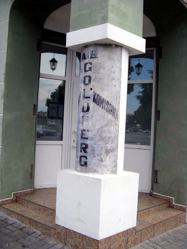 Пінск. Дом на скрыжаванні вуліц Леніна і Бялова